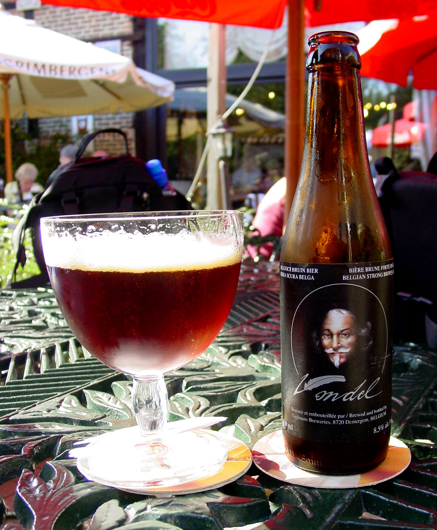 Vondel